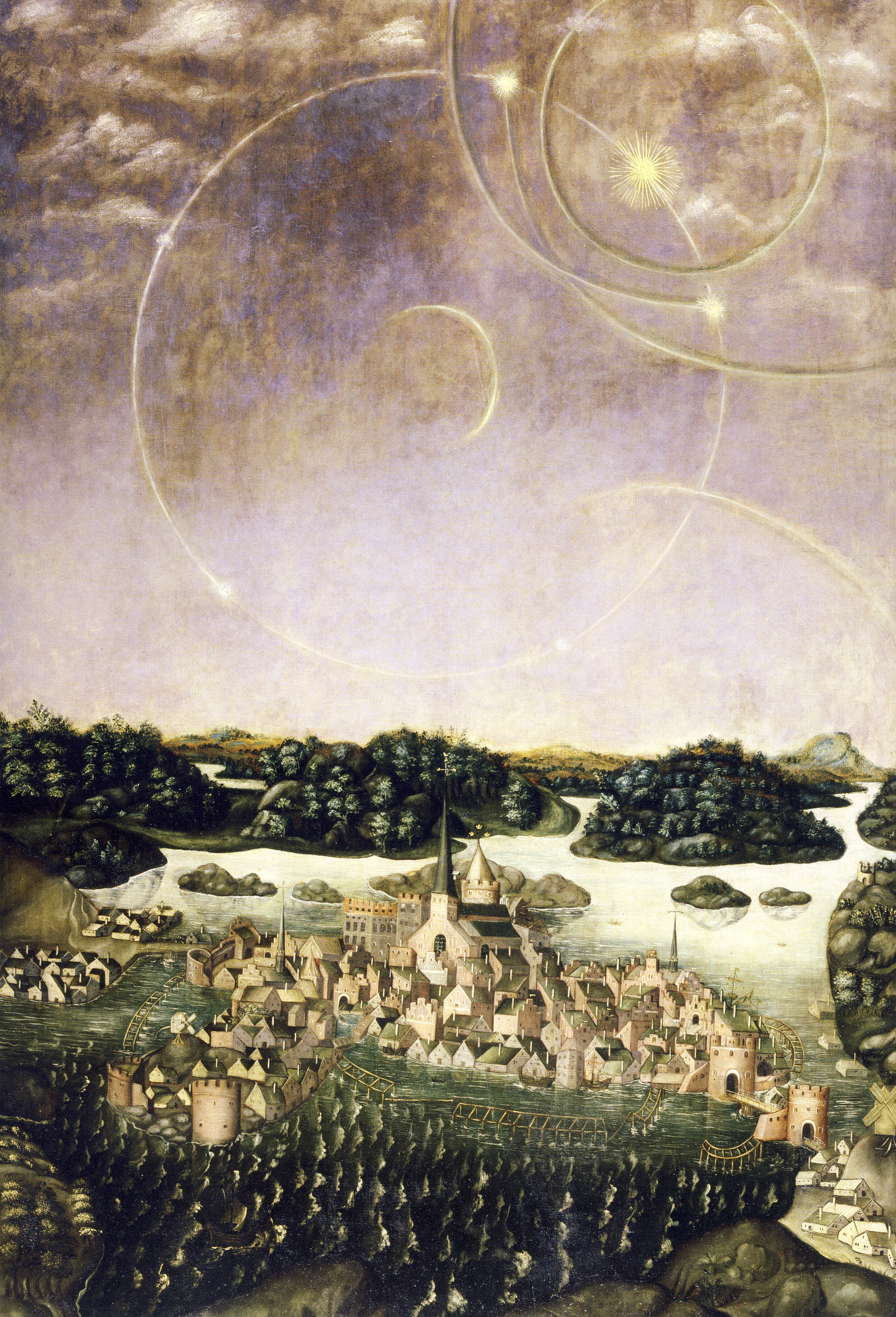 "Vädersolstavlan", ursprungligen målad av Urban målare 1535, hänger i Storkyrkan i Stockholm. Det är den äldsta bilden av Stockholm och finns avbildad på tusenkronorssedeln. Den nuvarande bilden är dock en kopia från 1630-talet av Jacob Elbfas